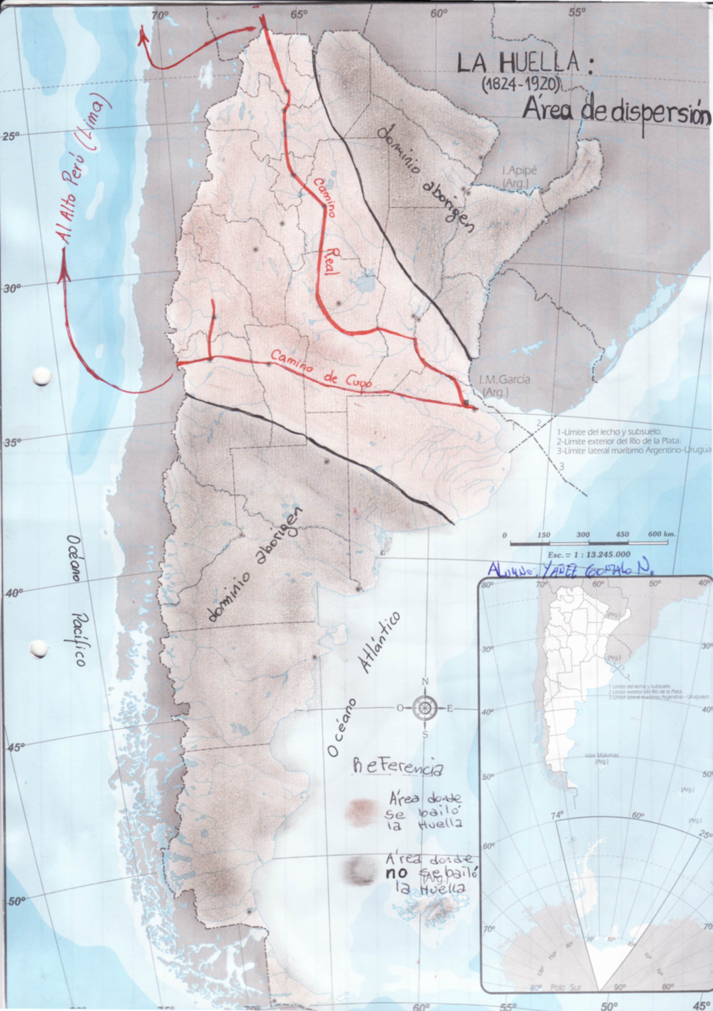 Área de disperción de la Huella